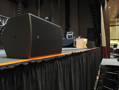 Colocación regular del susodicho sistema.